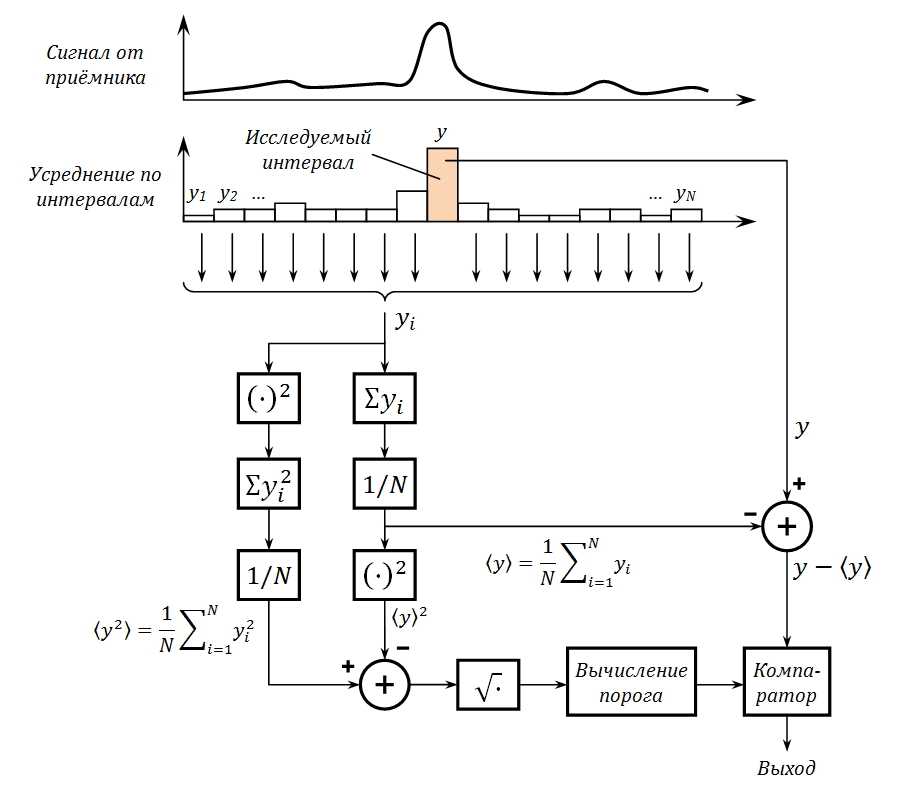 Алгоритм CFAR